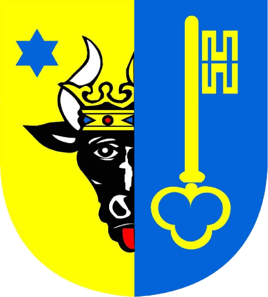 Am 10. April 1858 legte der Großherzog von Mecklenburg-Schwerin, Friedrich Franz II., das Röbeler Wappen fest, das unter der Nummer 71 der Wappenrolle von Mecklenburg-Vorpommern registriert wurde. Das Wappen wurde 1995 neu gezeichnet und in dieser Form gemeinsam mit der neu angenommenen Flagge am 4. Dezember 1998 vom Innenminister von Mecklenburg-Vorpommern genehmigt.